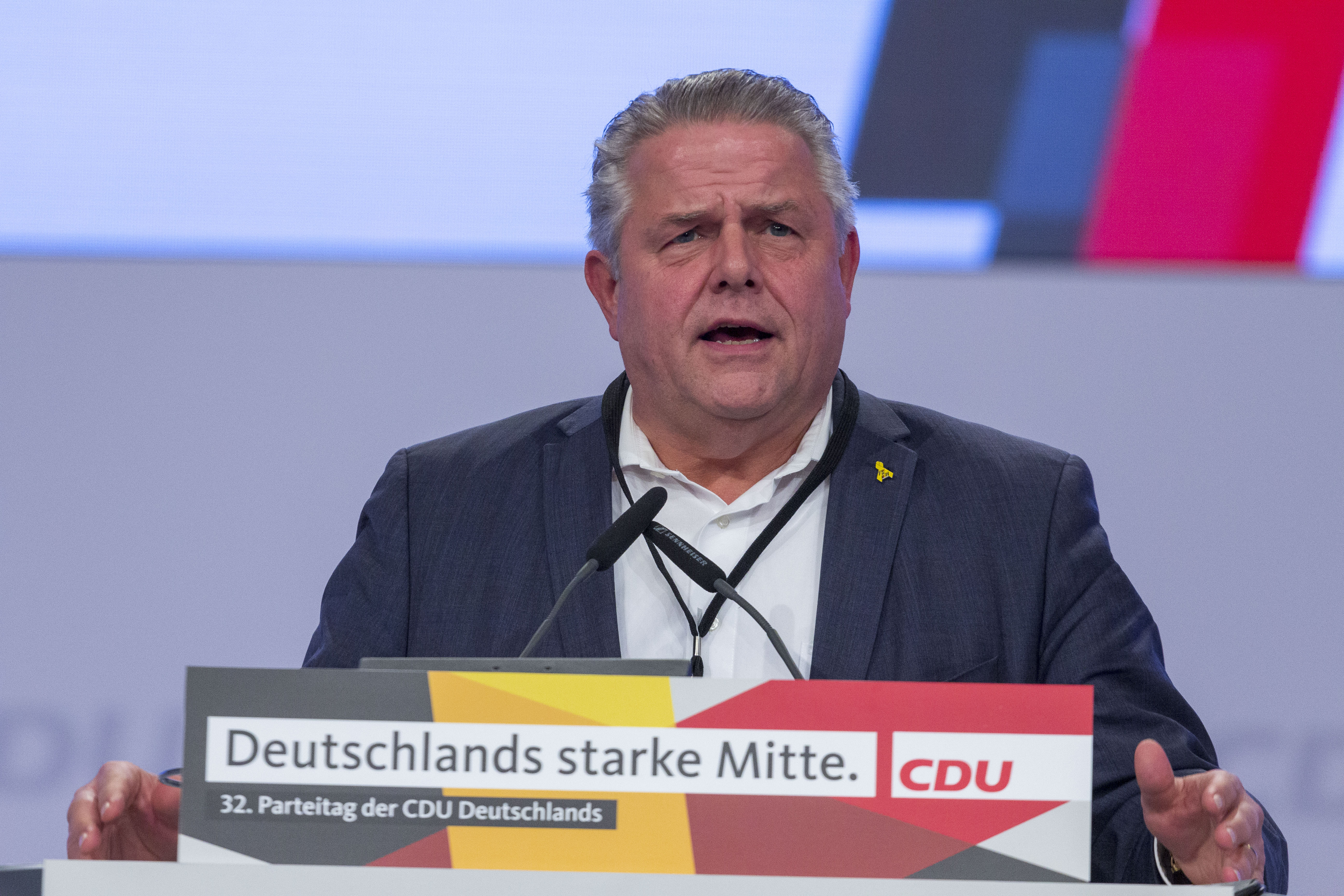 Klaus-Peter Willsch auf dem CDU Parteitag 2019 am 23. November 2019 in Leipzig.